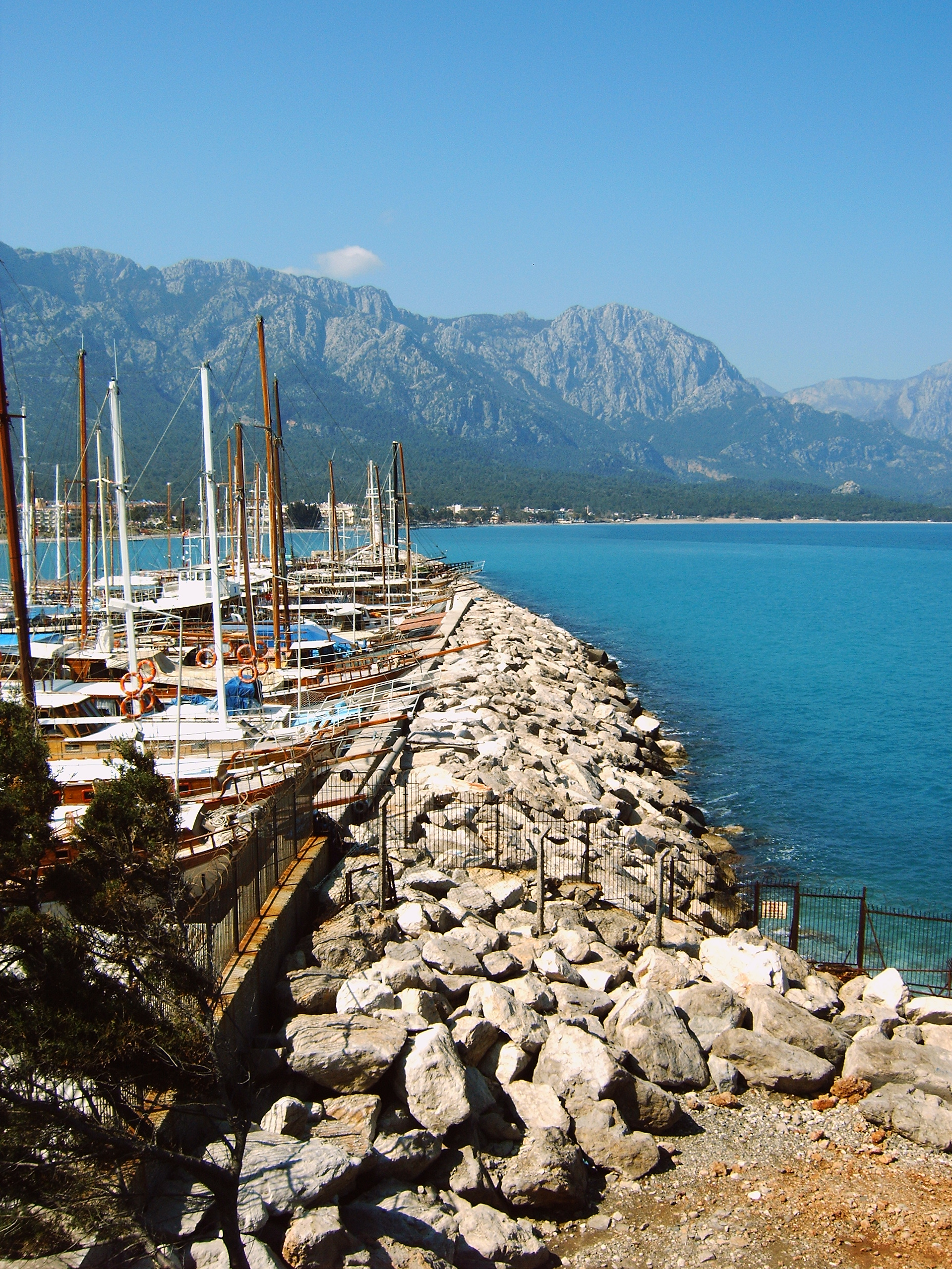 Marina in Kemer